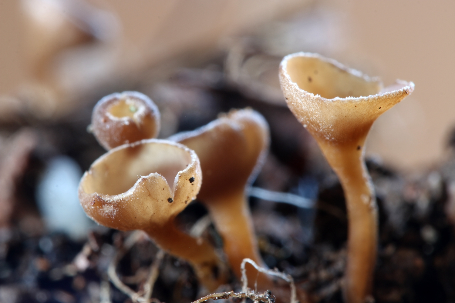 Monilinia johnsonii (siehe auch Monilinia), Apothecien